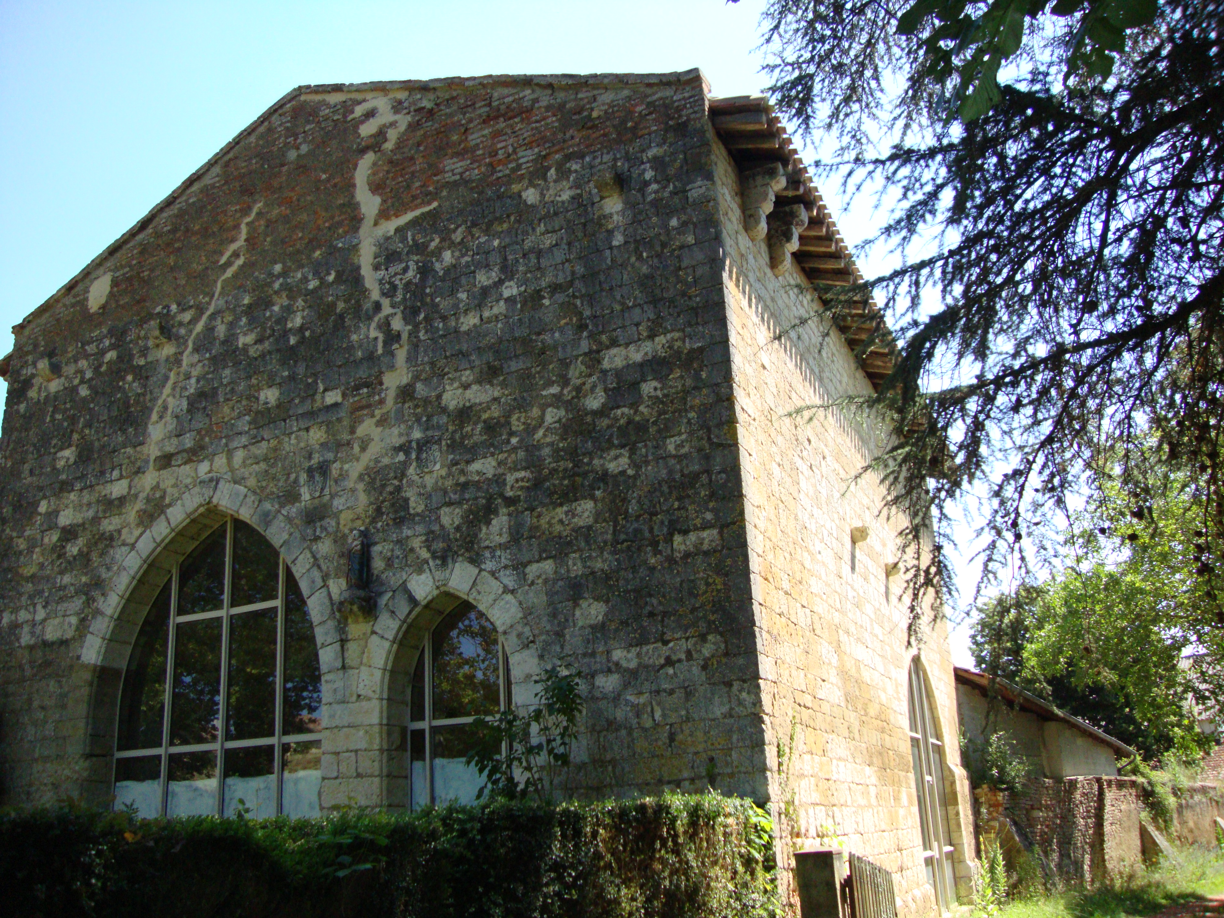 Gimont (Gers, Fr) vestiges Abbaye de Planselve